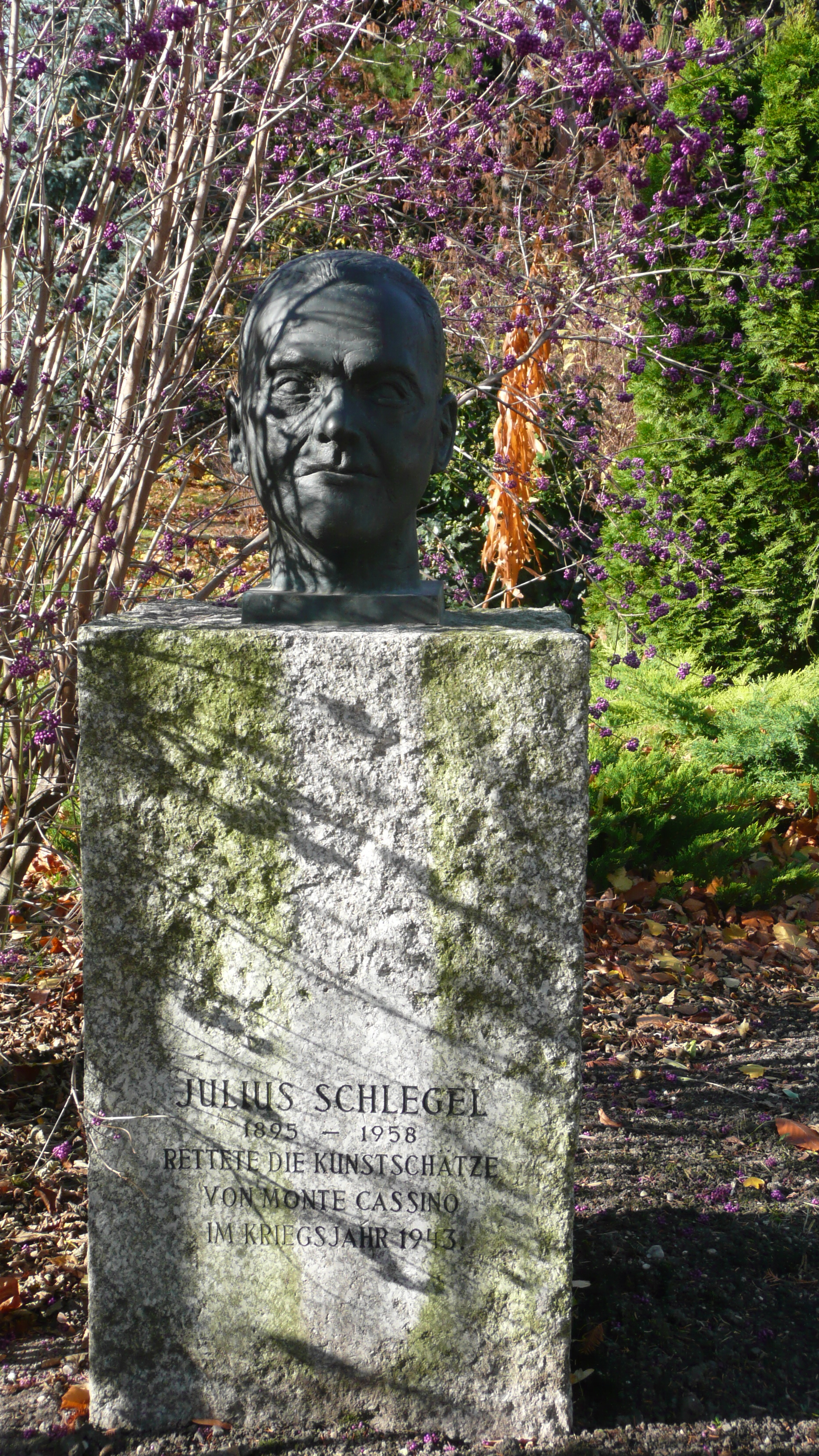 Julius Schlegel (1895-1958) - deutscher Wehrmachtsoffizier, rettete 1943 die Kunstschätze des Klosters von Monte Cassino - Denkmal im Wertheimsteinpark in Wien